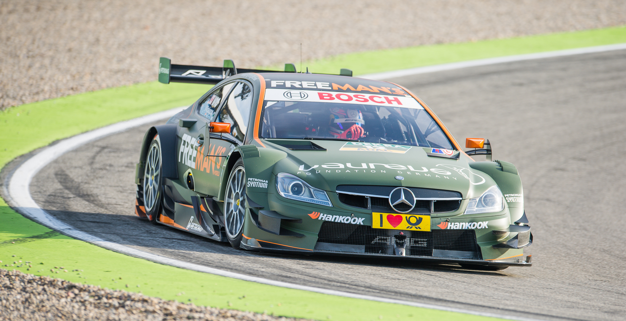 DTM,Deutsche Tourenwagen Masters,FREE MAN'S WORLD Mercedes AMG C-Coupe,HWA AG,Hockenheimring,Motorsport,Robert Wickens